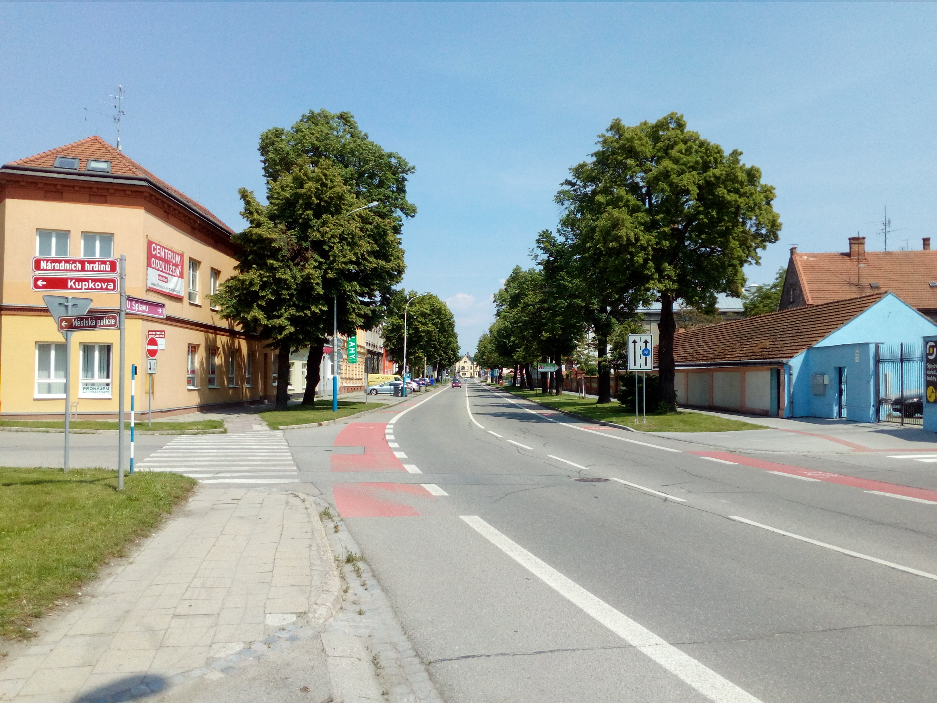 Silnice I/55 procházející Břeclaví, třída Národních hrdinů